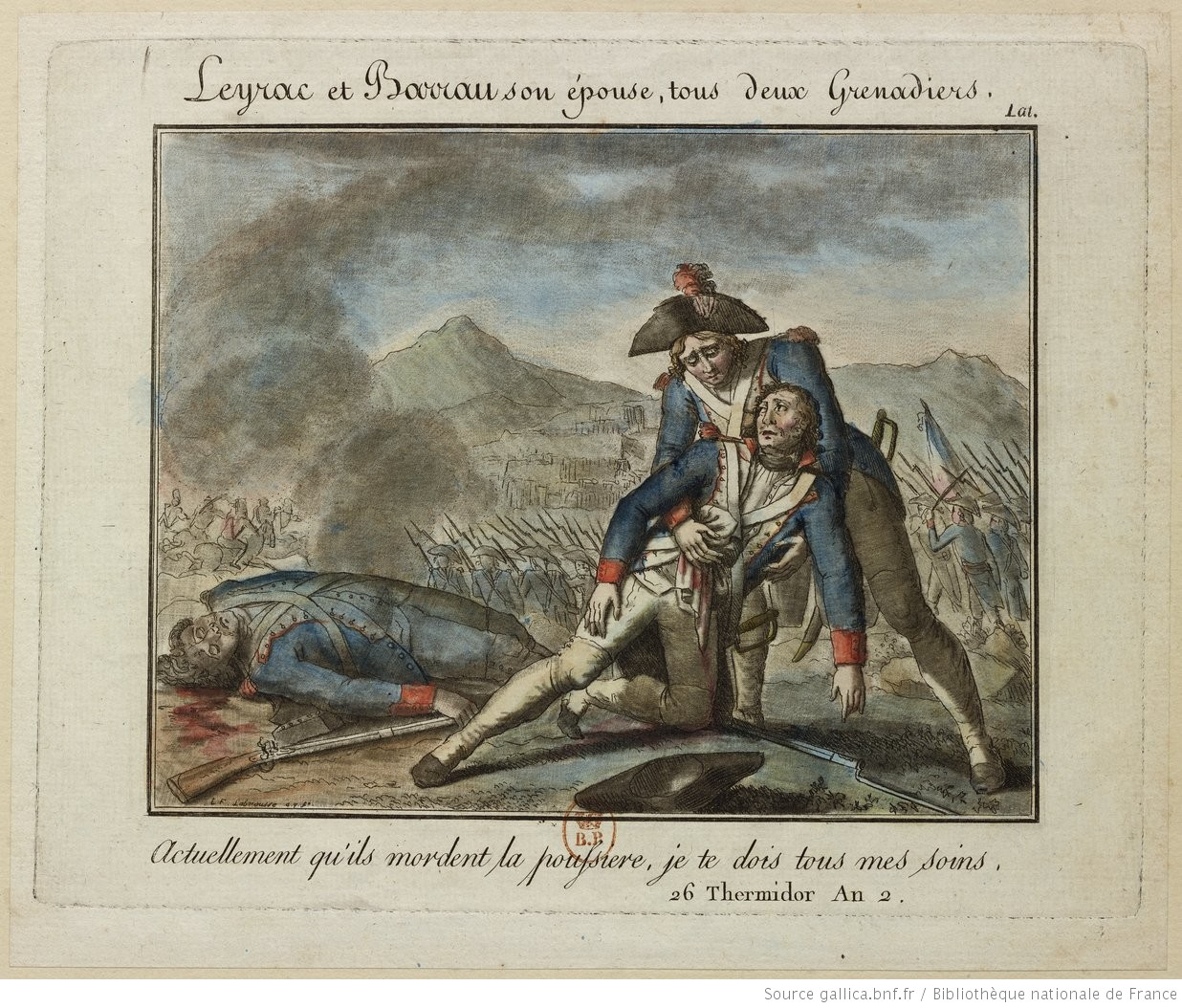 Couple de grenadiers servant dans la même unité en 1794